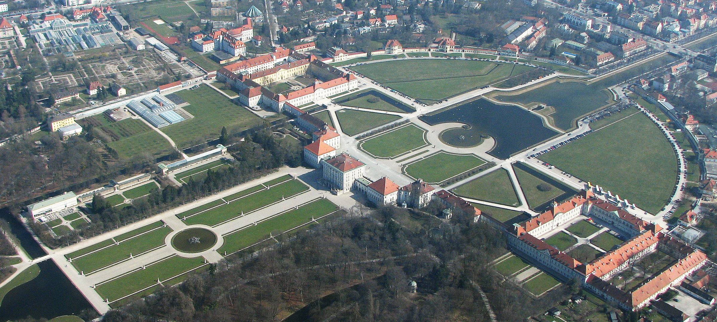 Luftbild aerial photograph Park und Schloss Nymphenburg München Bayern Bavaria Germany - Foto Wolfgang Pehlemann HSBD1057